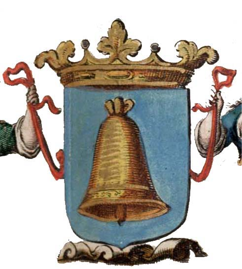 Gemeentewapen van Franeker. Detail van de stadsplattegrond door Blaeu uit 1649